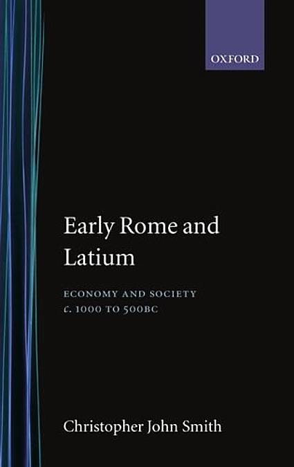 Christopher Smith: Early Rome and Latium: Economy and Society c. 1000 to 500 BC. Oxford University Press, New York 1996, ISBN 9780198150312.